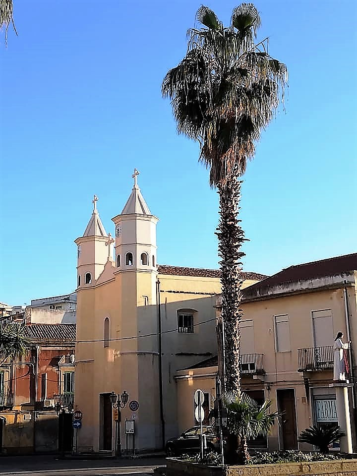 Chiesa del Santissimo Crocifisso. Panoramica.